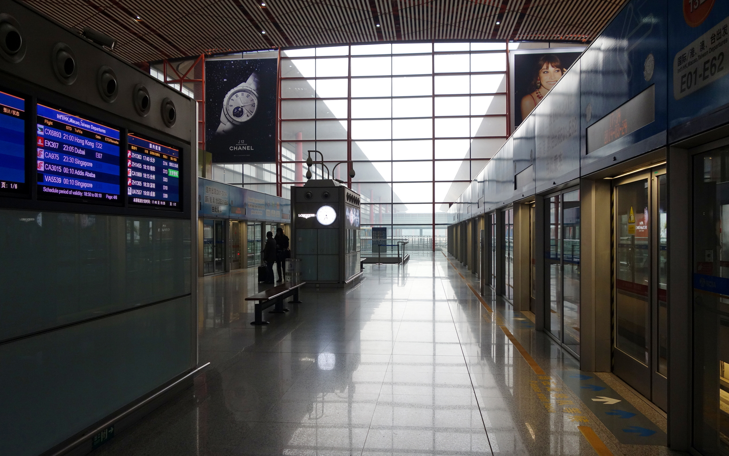 北京首都国际机场3号航站楼T3C轨道交通站台